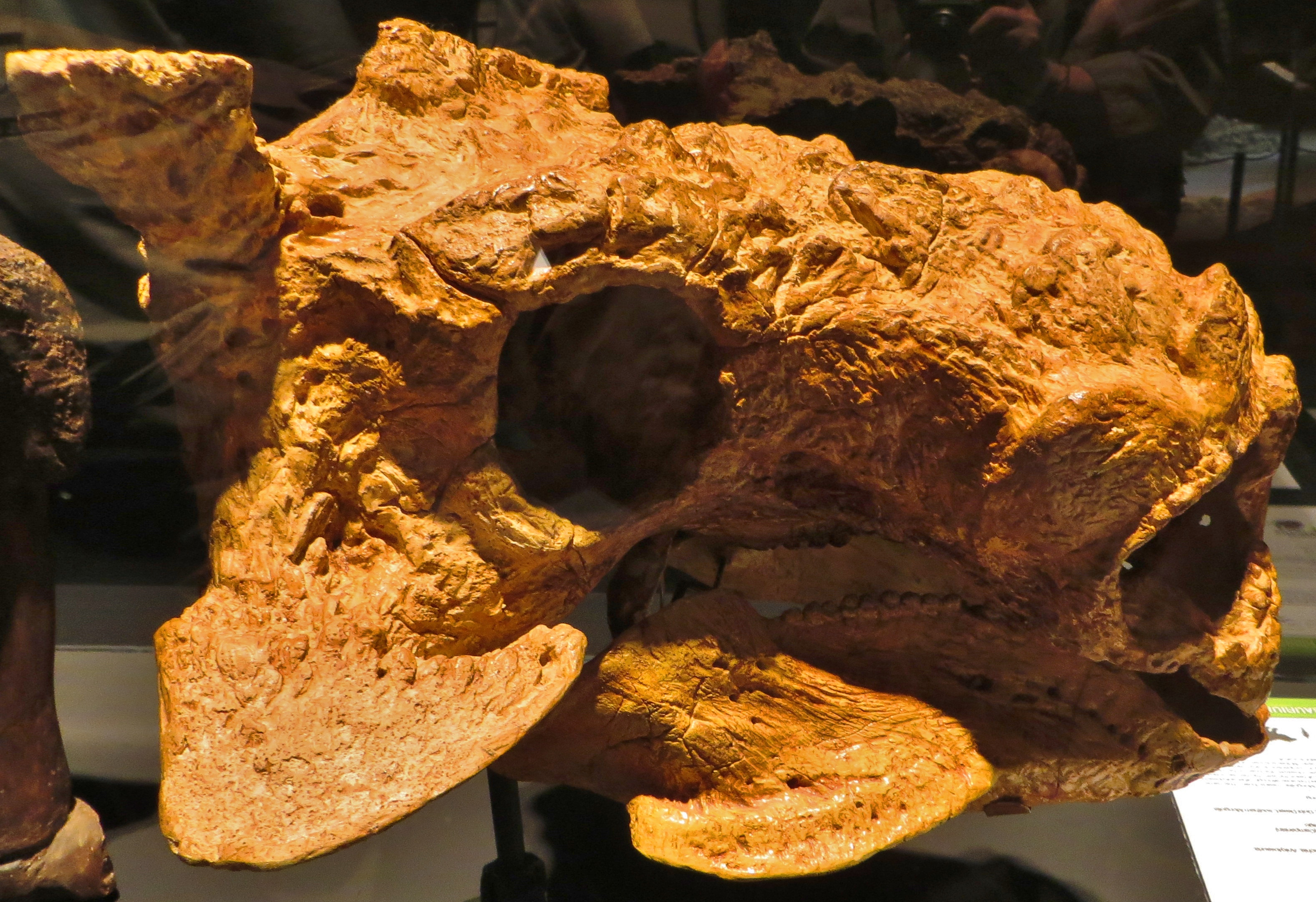 Fossil of Tarchia, an extinct reptile- Took the picture at Dinosaurium, Prague